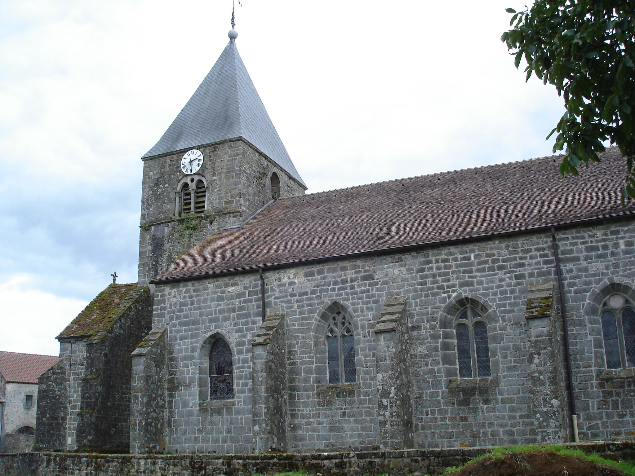 L'église de Pouilly-en-Bassigny (commune de Le Châtelet-sur-Meuse, Haute-Marne) - classée MH